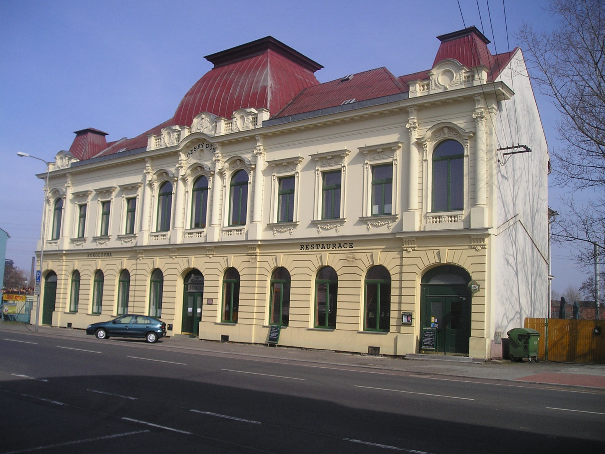 Český dům